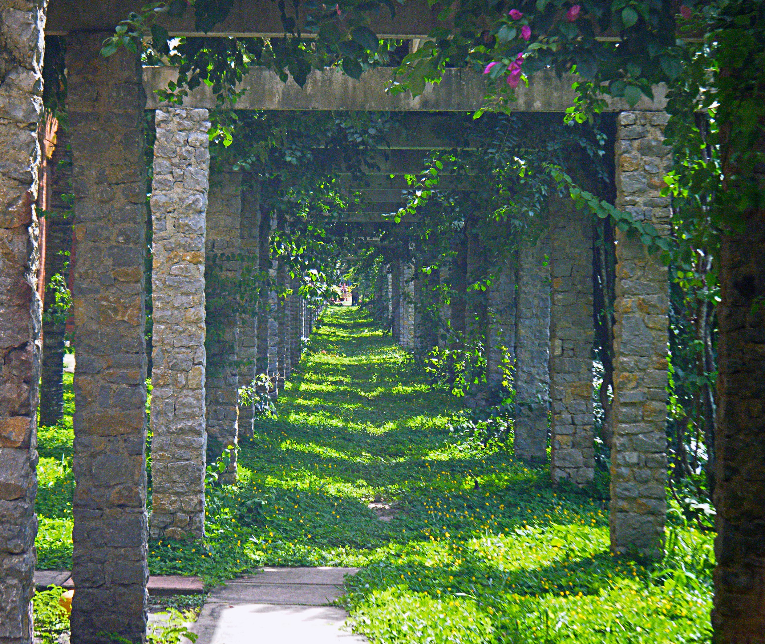 Dentro del Centro Comercial La Cascada de Maturin, Estado Monagas. Justo al lado de la laguna artificial. Venezuela.